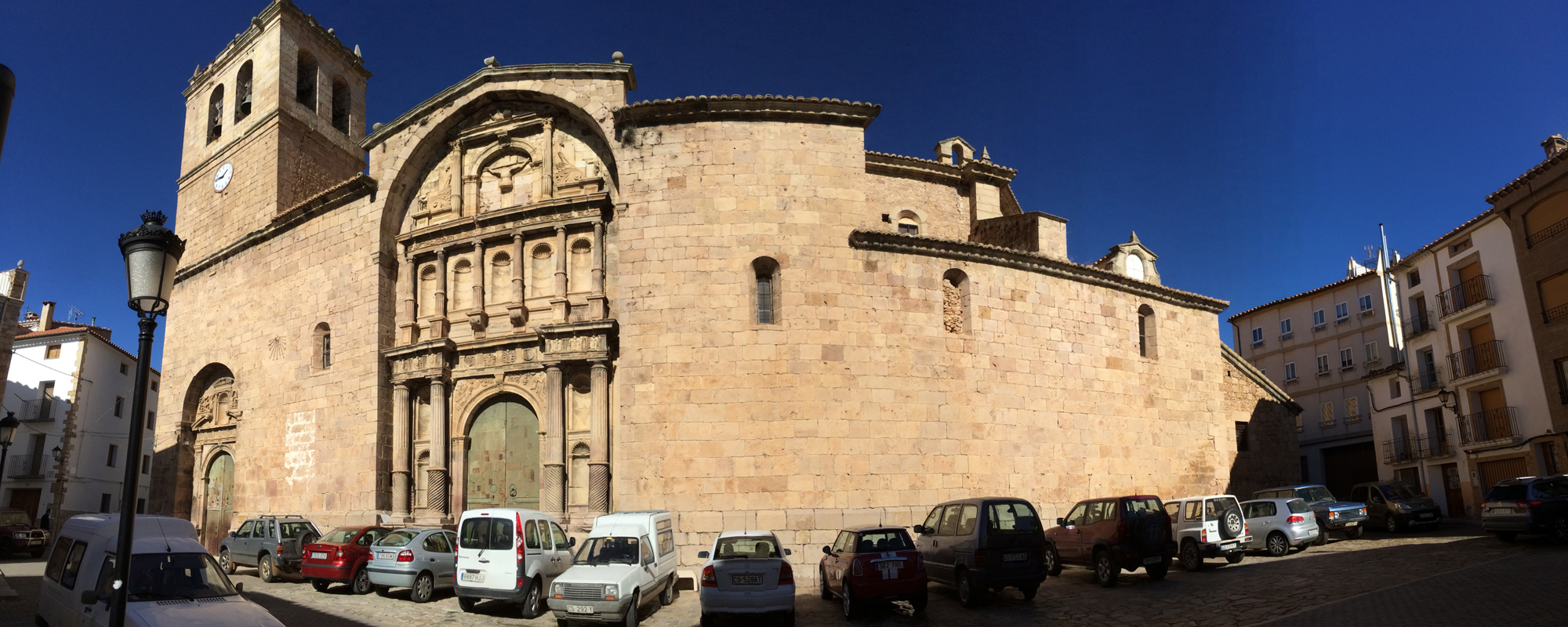 Foto Panorámica